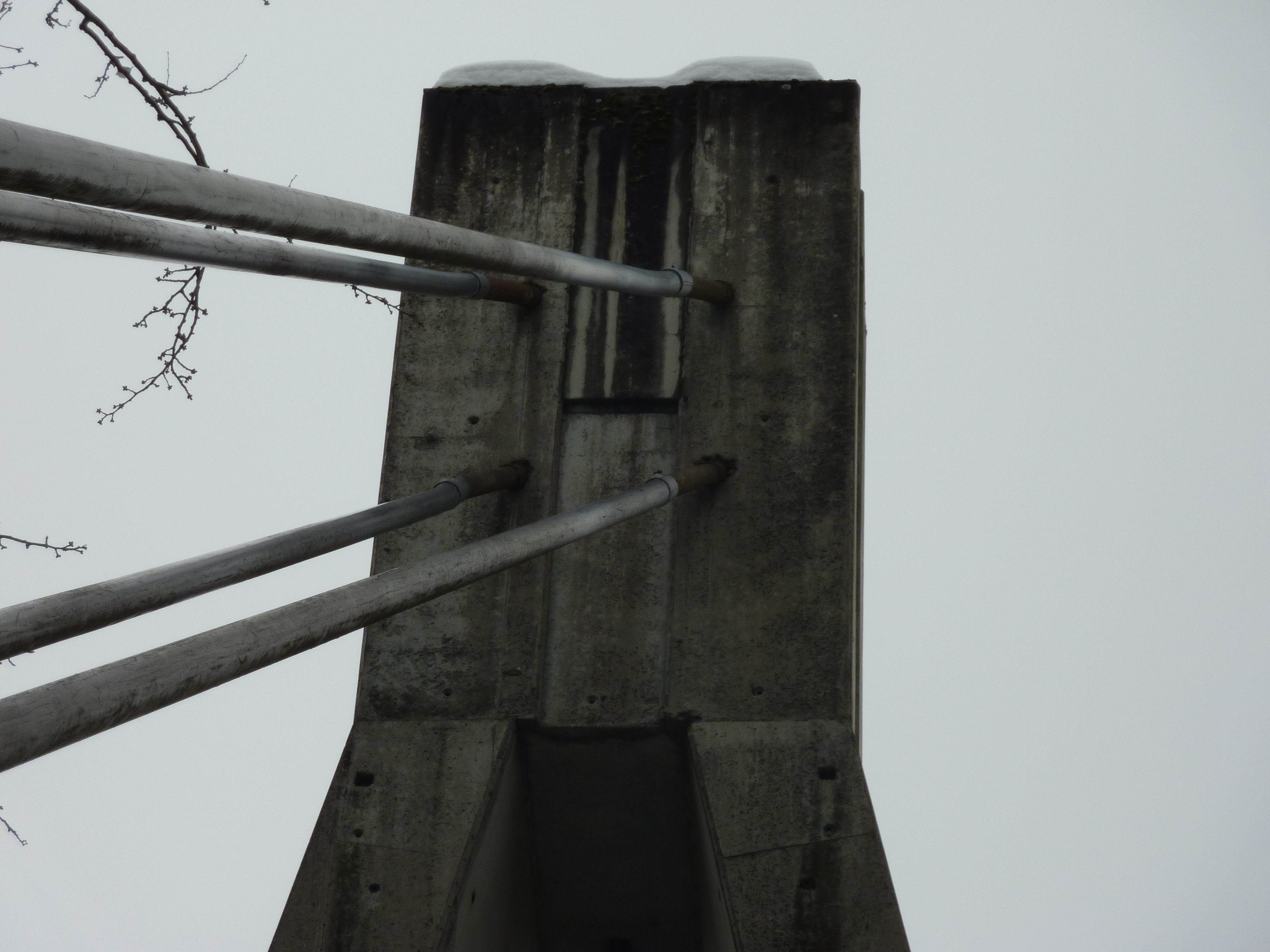 accrochage des cables